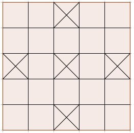 ദായക്കളി